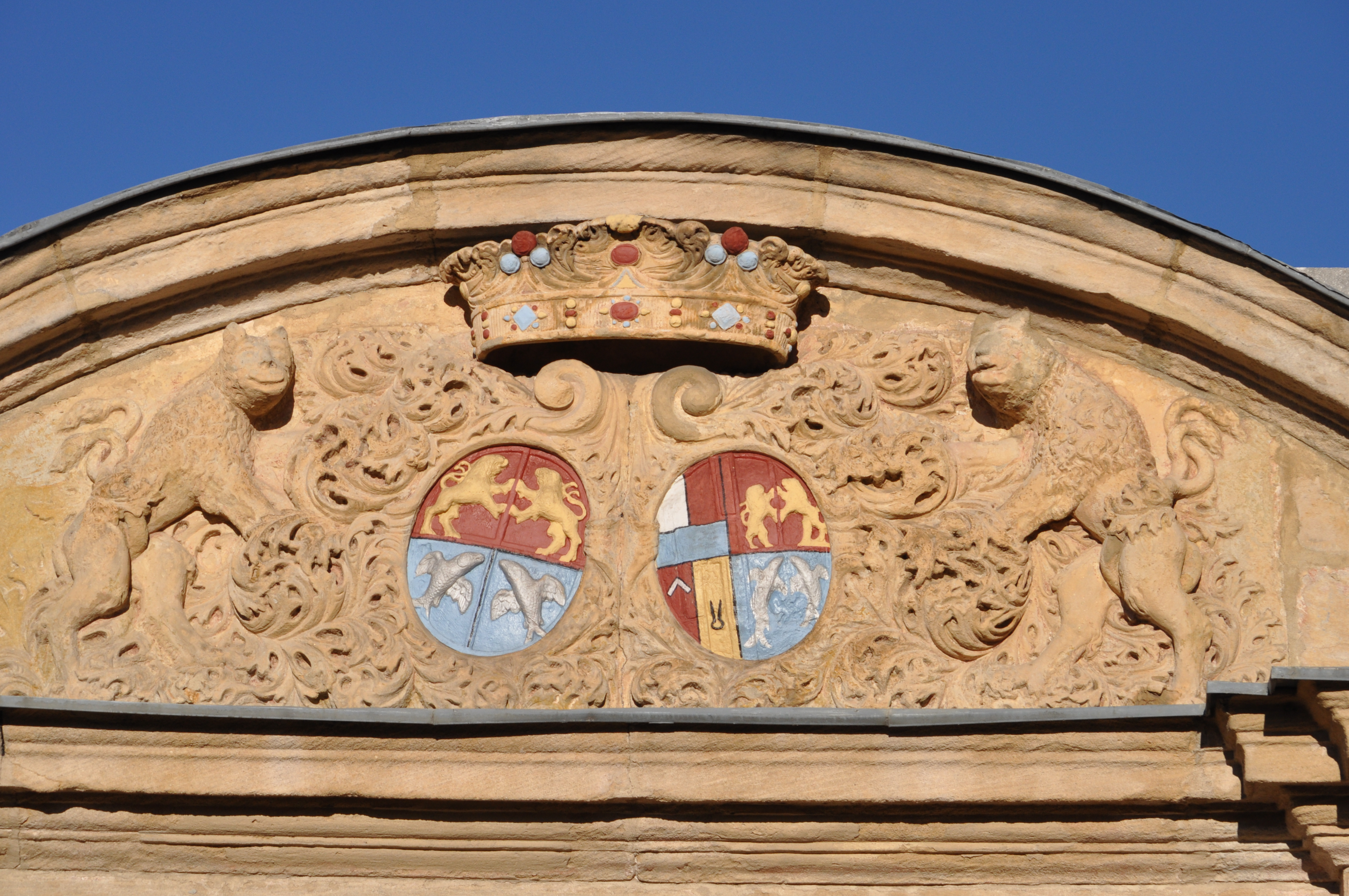 Wappen am Portal neben Schloss Schney in Lichtenfels-Schney.